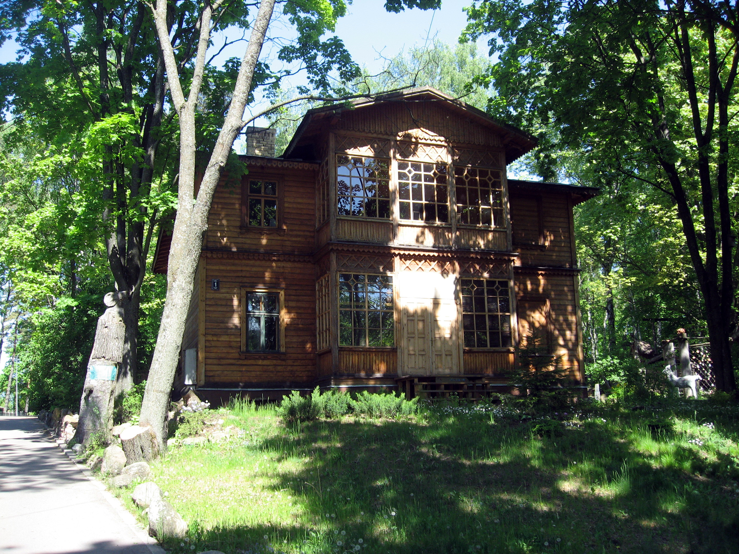 Jūrmala